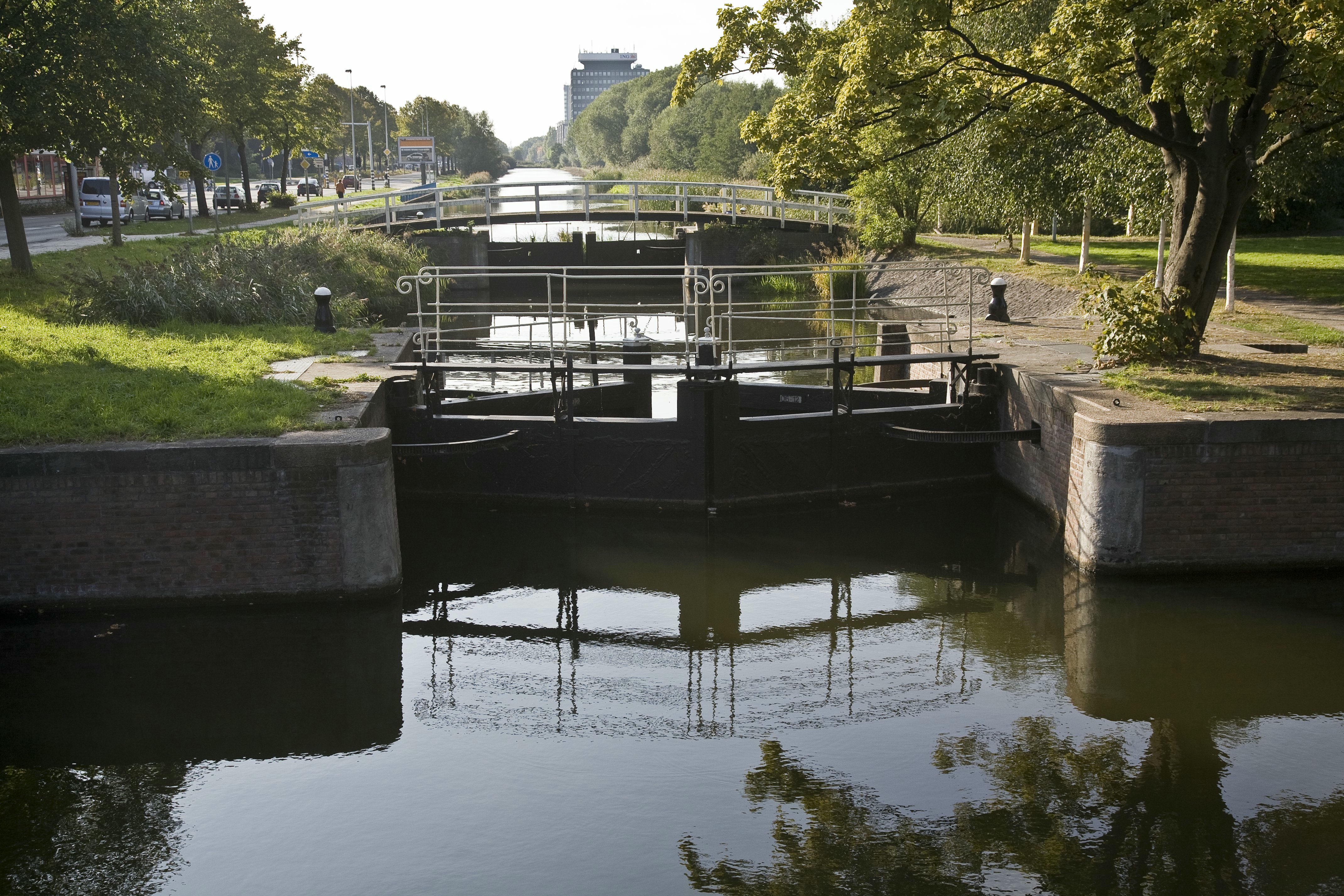 Schutsluis Haarlemmervaart - schutsluis: Sluis in de Haarlemmervaart, bij de Van Slingelandtstraat (opmerking: Gefotografeerd t.b.v. publicatie "Tussen Haarlemmerpoort en Halfweg" (auteurs: Jaap Evert Abrahamse - Menne Kosias en Erik Schmitz))